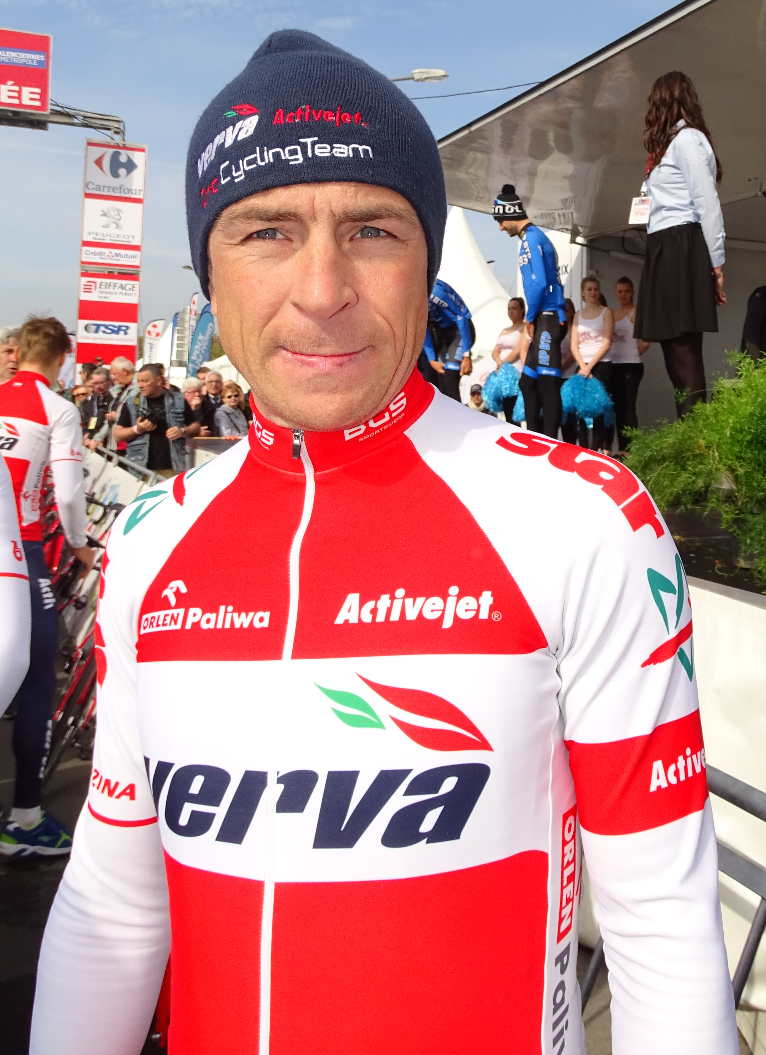 Reportage réalisé le jeudi 14 avril à l'occasion du départ et de l'arrivée du Grand Prix de Denain 2016 à Denain, Nord, Nord-Pas-de-Calais-Picardie, France.